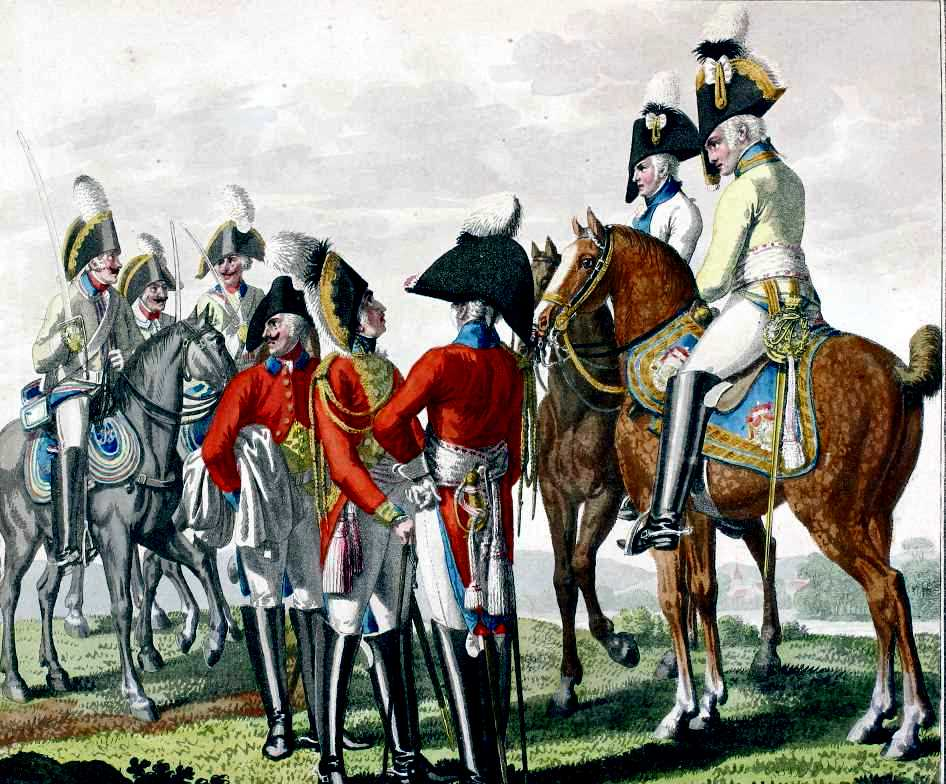 Chevaulegers und Schwere Kavallerie. Im den Jahren 1805 und 1806 fertigte Carl Adolph Heinrich Hess eine sowohl künstlerisch ansprechende als auch uniformkundlich interessante Serie von 16 Tafeln über die damalige sächsische Armee. Der Titel der Serie lautet Abbildung der Chur-Sächsischen Truppen in ihren Uniformen unter der Regierung Friedrich August III. Die Tafeln bestechen durch ihren Detaillierungsgrad und bieten eine wertvolle Unterstützung bei der Beurteilung des äußeren Erscheinungsbildes der sächsischen Armee während des Feldzuges von 1806.